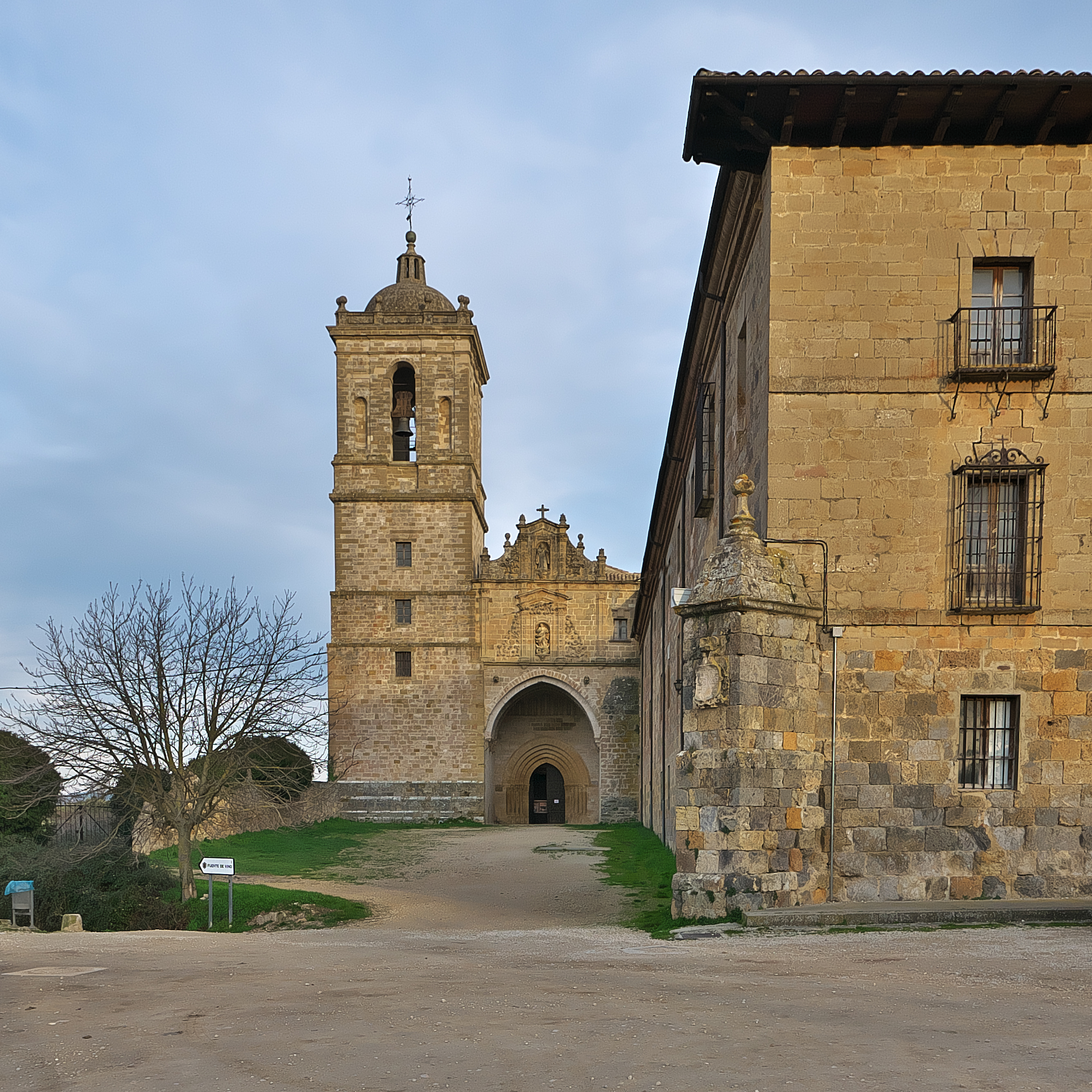 Fachada oeste del monasterio.